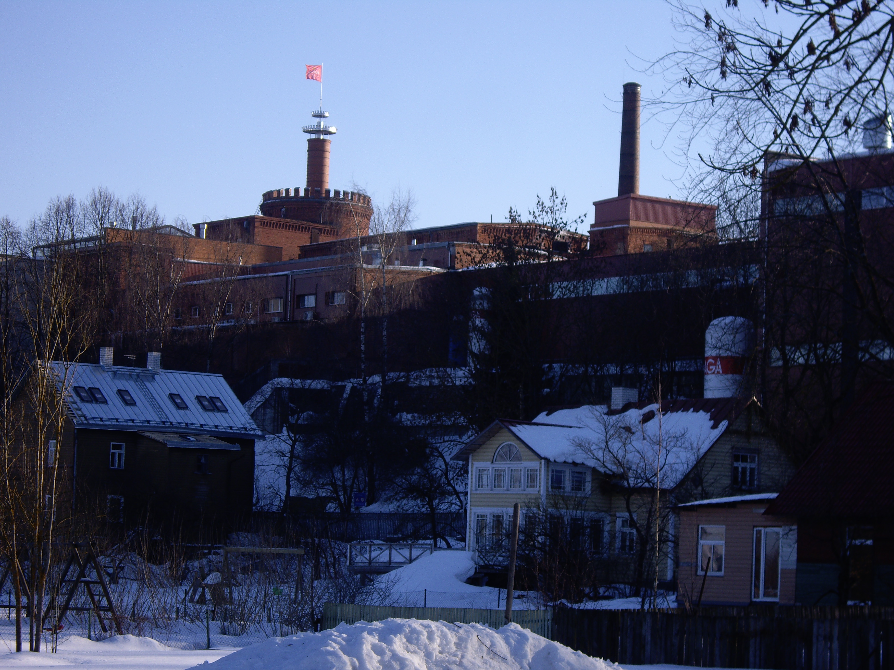 A. Le Coqi õlletehas Tartus, 2011